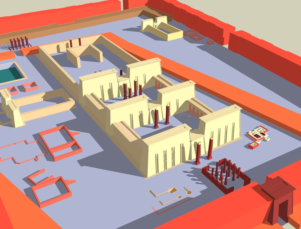 Essai de restitution en élévation des monuments de l'enceinte d'Amon à Tanis